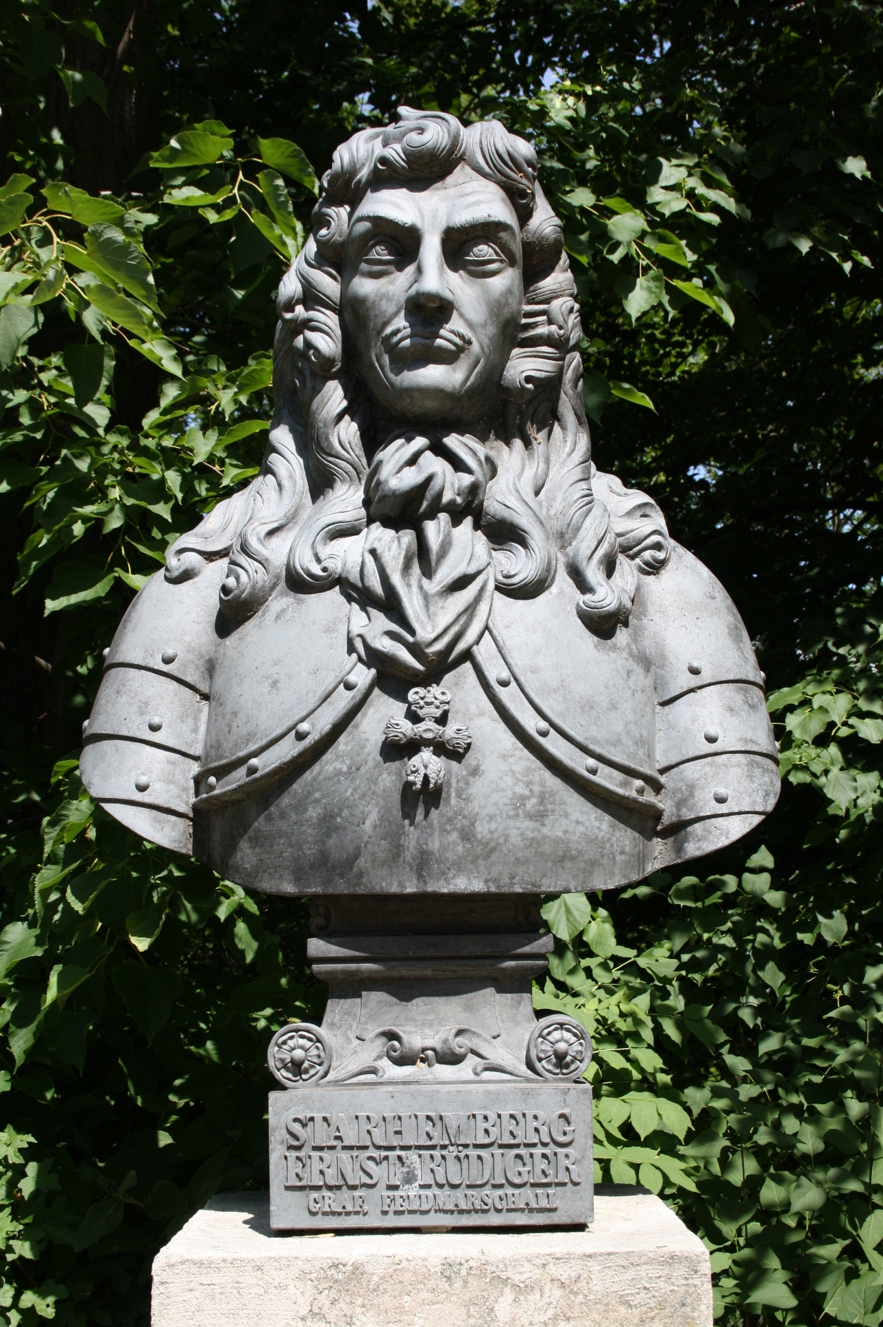 Büste in der Gedenkstätte Heldenberg (Niederösterreich)